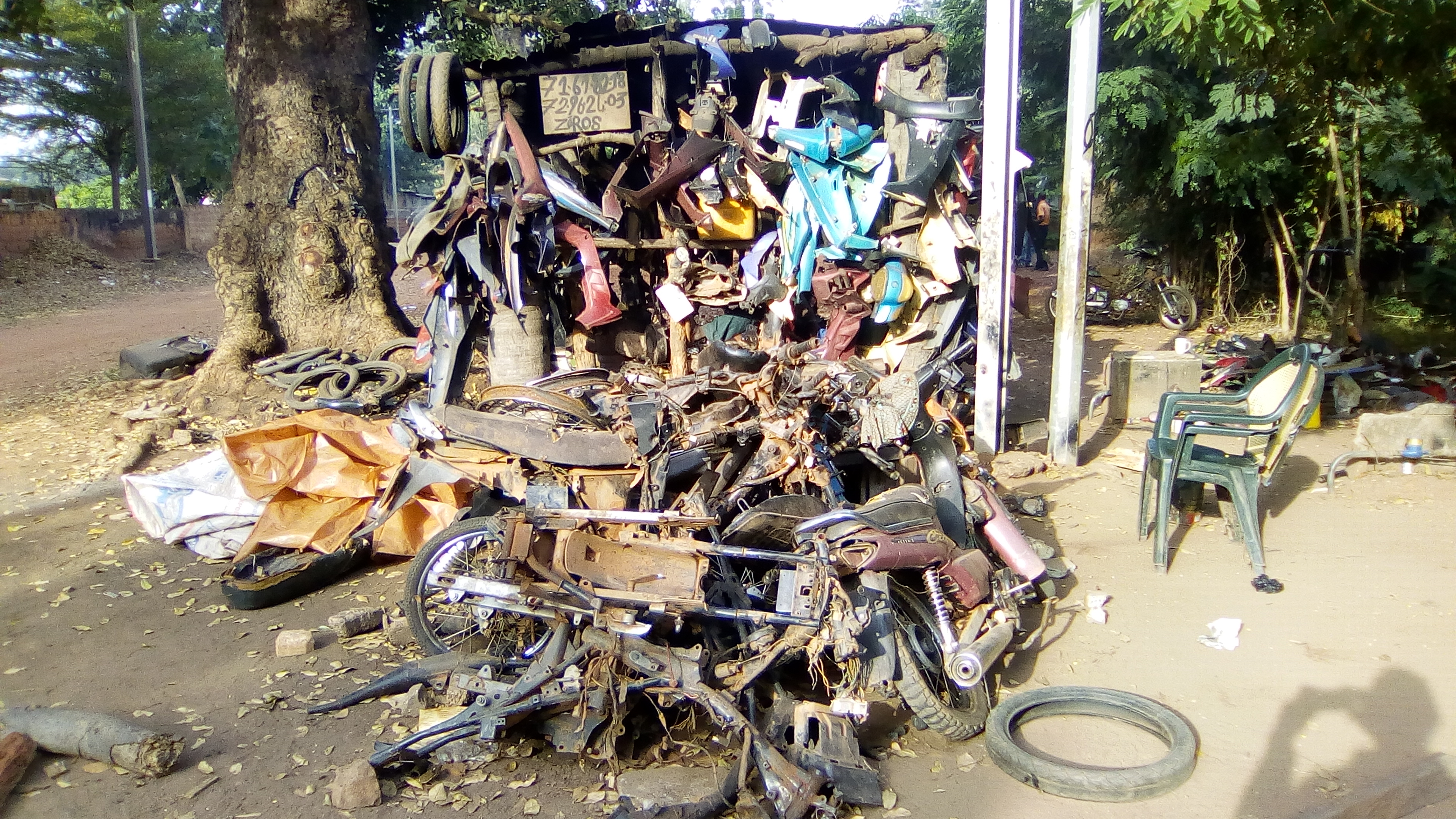 Burkina Faso-Banfora Magasin de pièces détachées pour 2 roues (2). On dirait une compression de César. This is an image with the theme "Africa on the Move or Transport" from: Burkina Faso